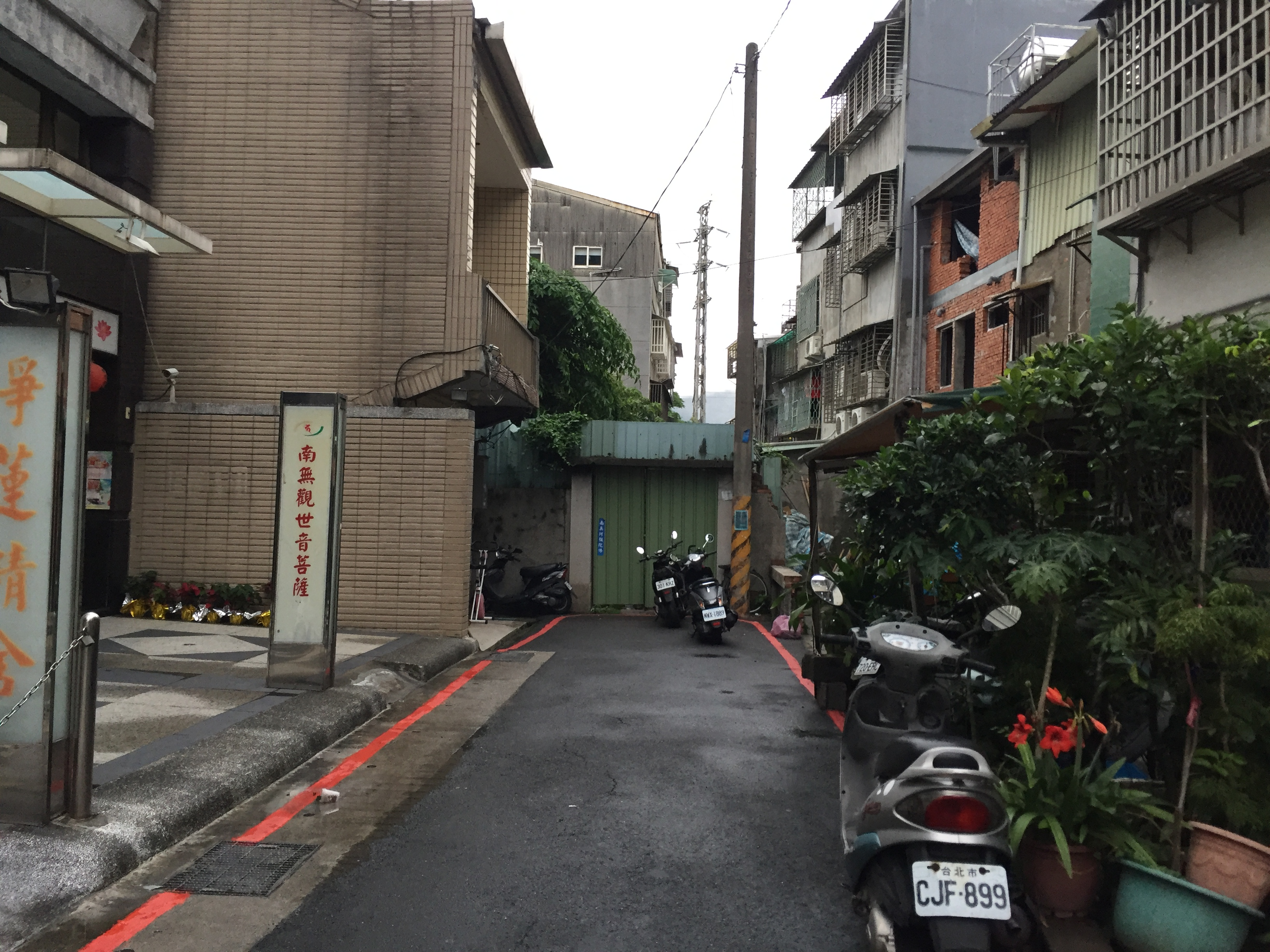 台灣台北市士林區華榮街延伸段